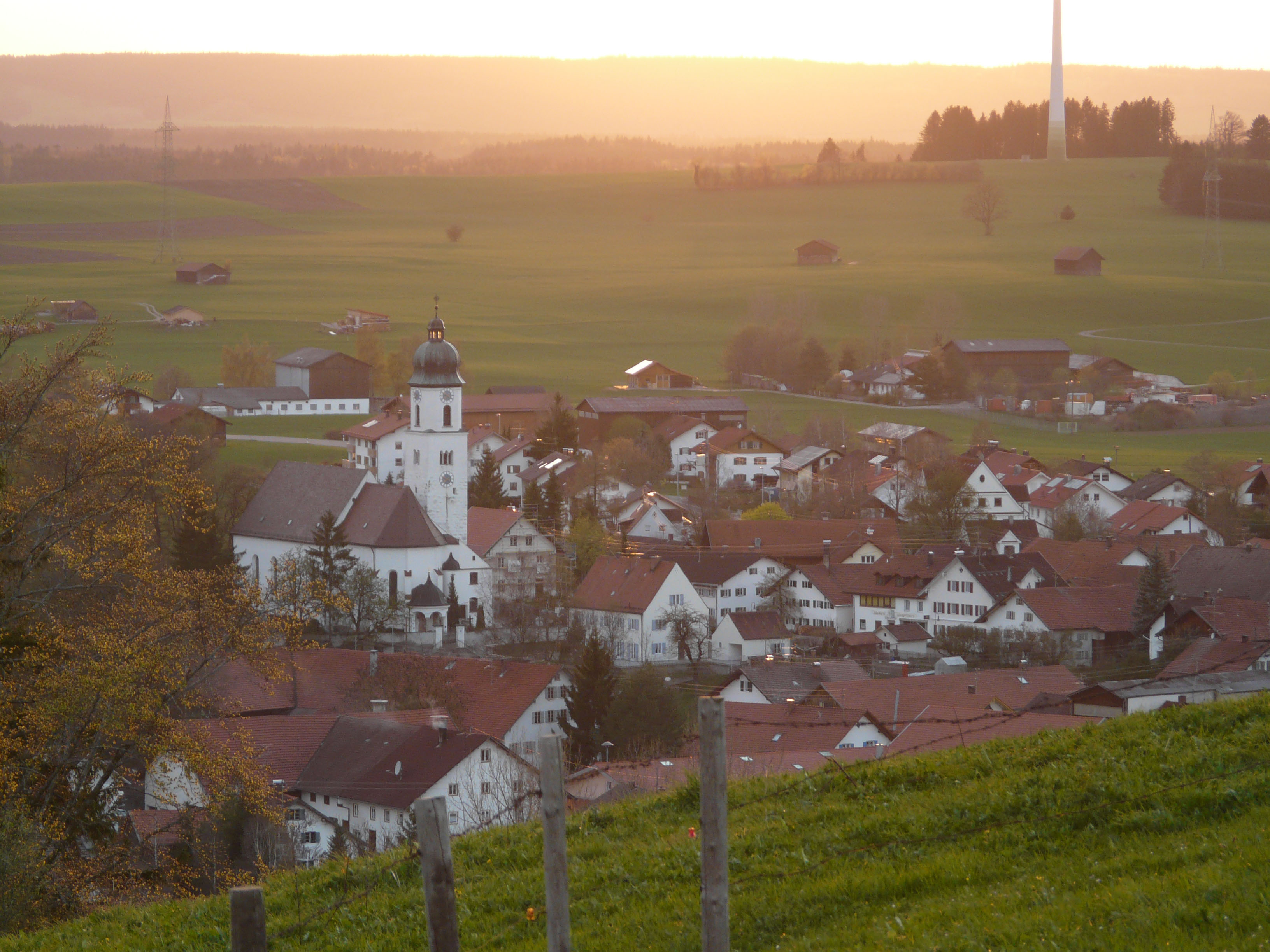 Bidingen von Osten